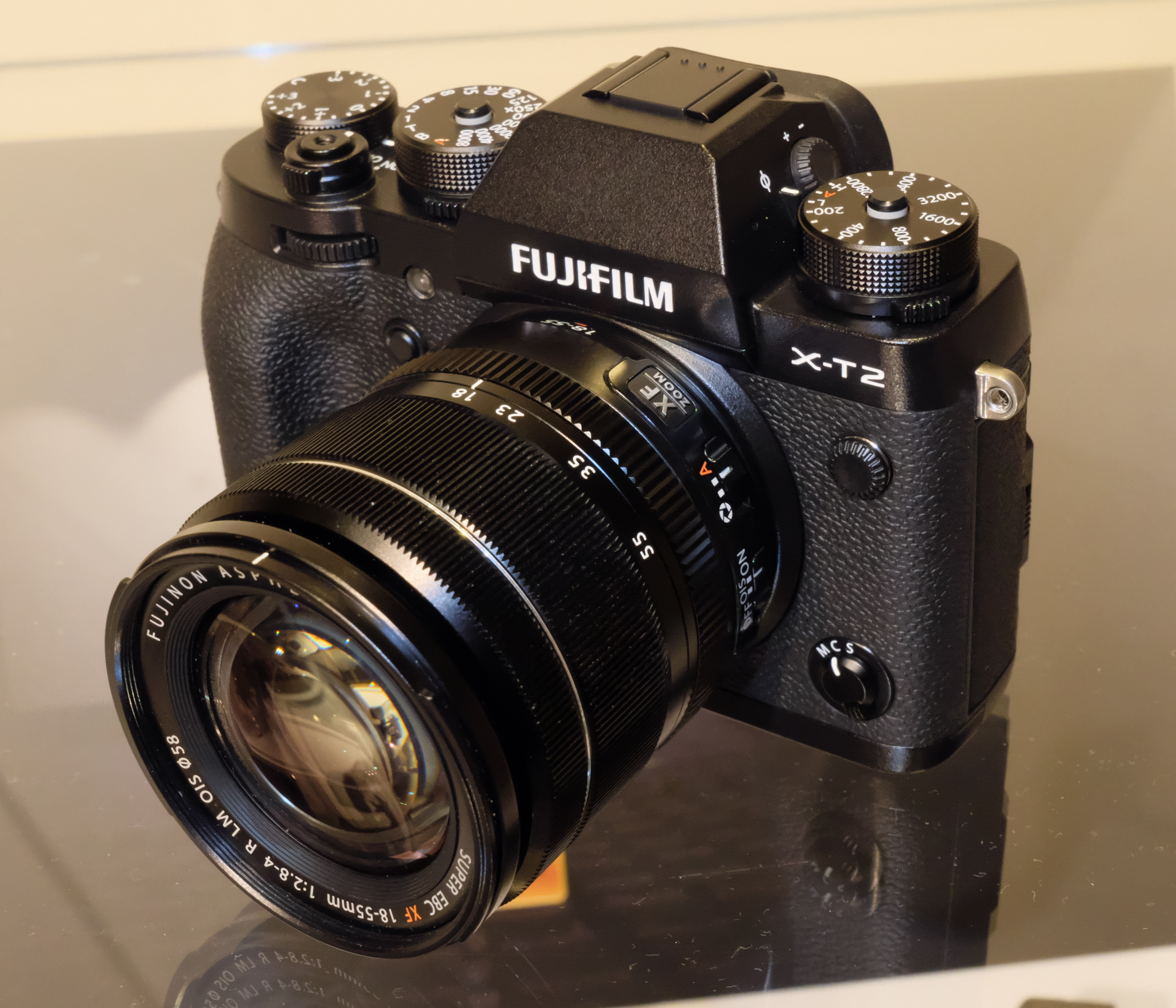 FUJIFILM X-T2（2016/07/16の新製品体験イベントにて撮影）